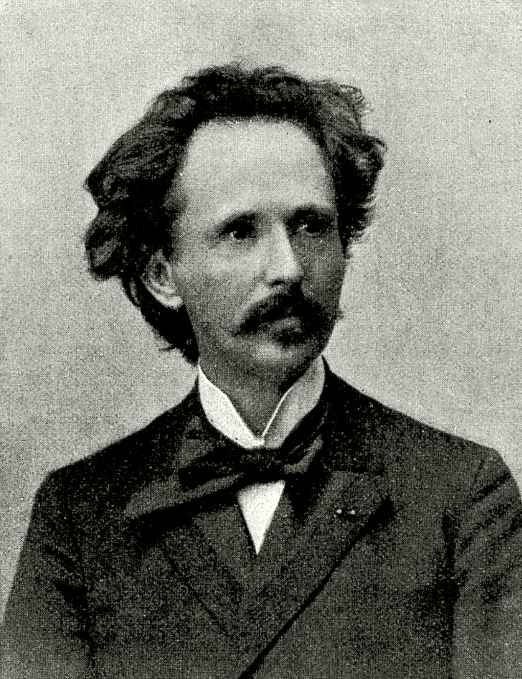 Franz Curti (1854-1898) Opern-Komponist- Fotografie von Tillmann-Matter, Mannheim